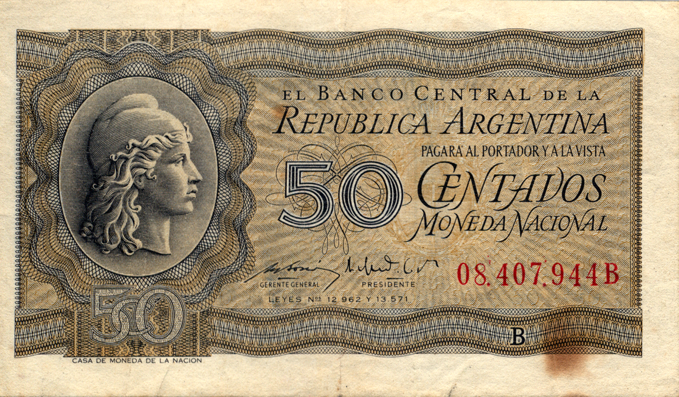 Anverso de un billete 50 centavos de Peso Moneda Nacional, emitido durante las primeras presidencias de Juan Domingo Perón.